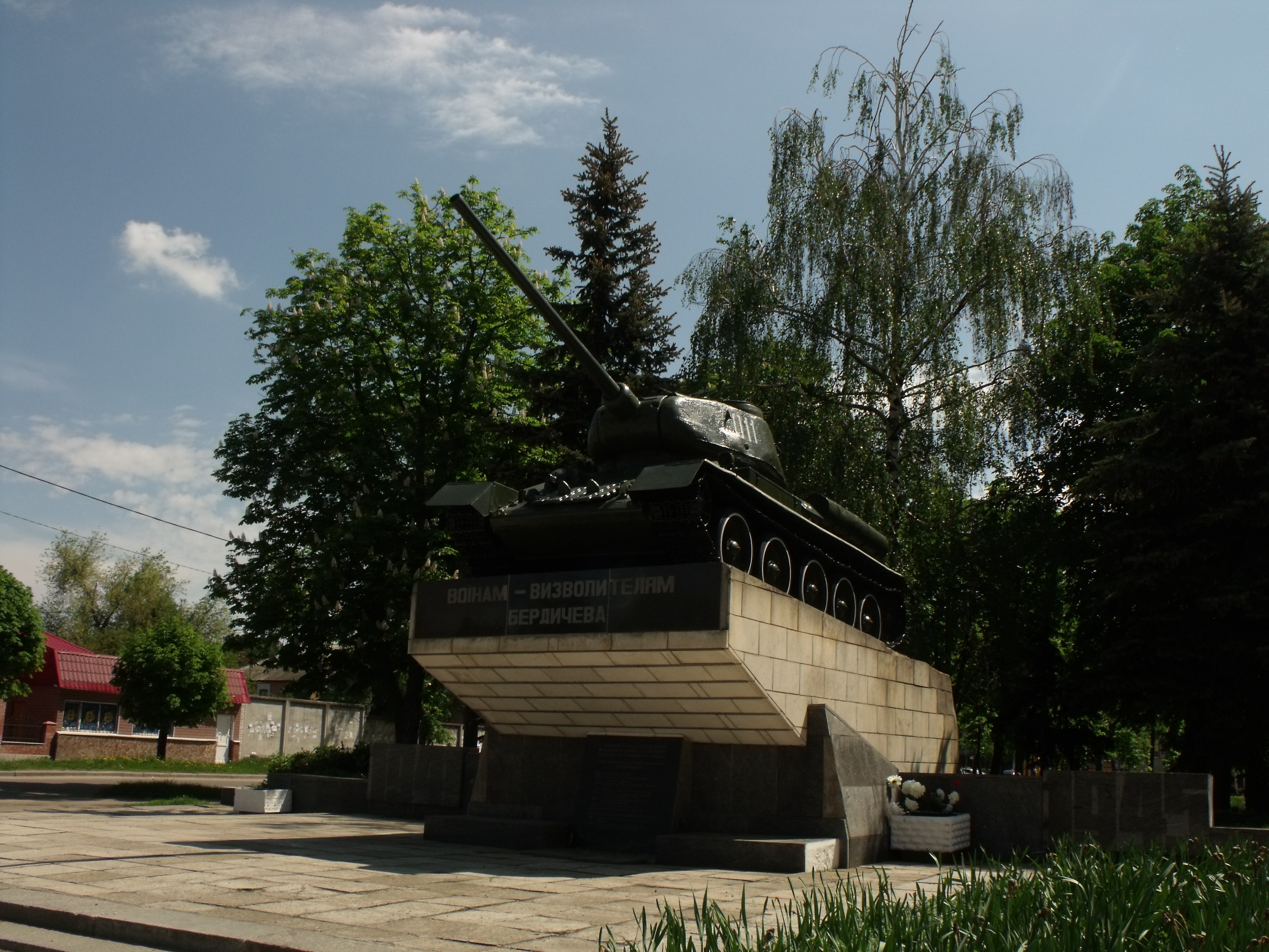 Пам'ятник воїнам — визволителям: Бердичів, Площа Перемоги